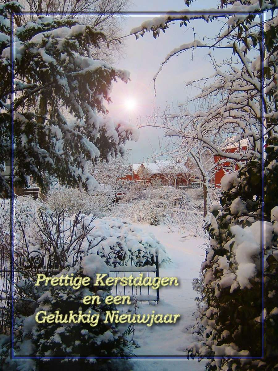 Kerstkaart voorbeeld.